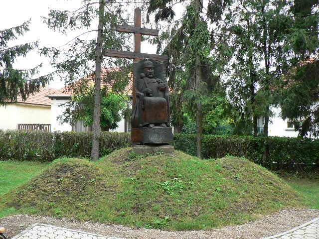 Szent István szobra Abaújszántó, István király tér (2003, emlékmű, fa, Frech Ottó alkotása) forrás:[1]